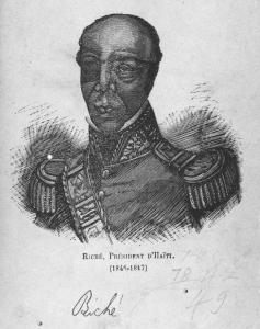 Portrait du président d'Haïti Jean-Baptiste Riché.